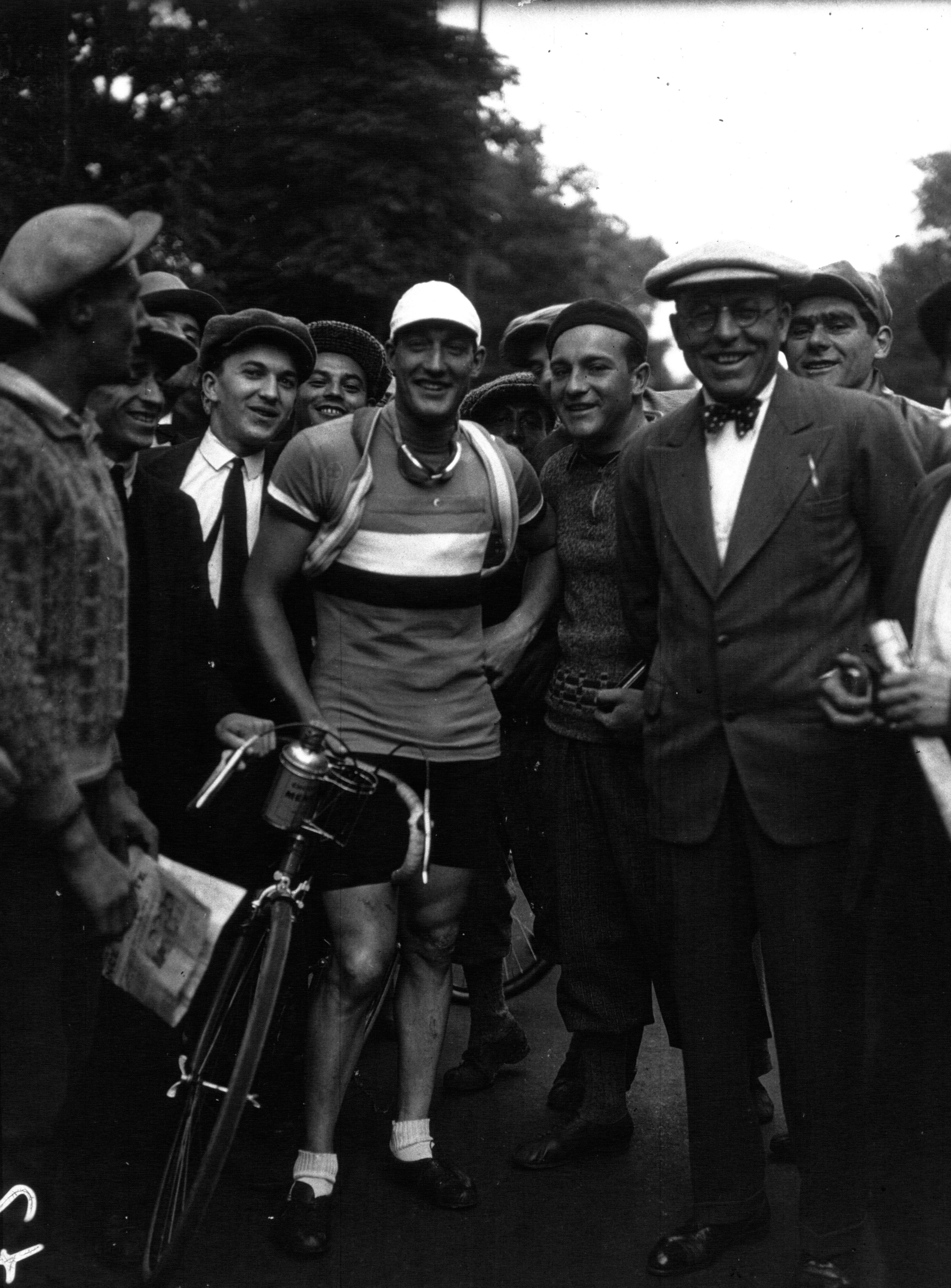 André Leducq lors du Tour de France 1932